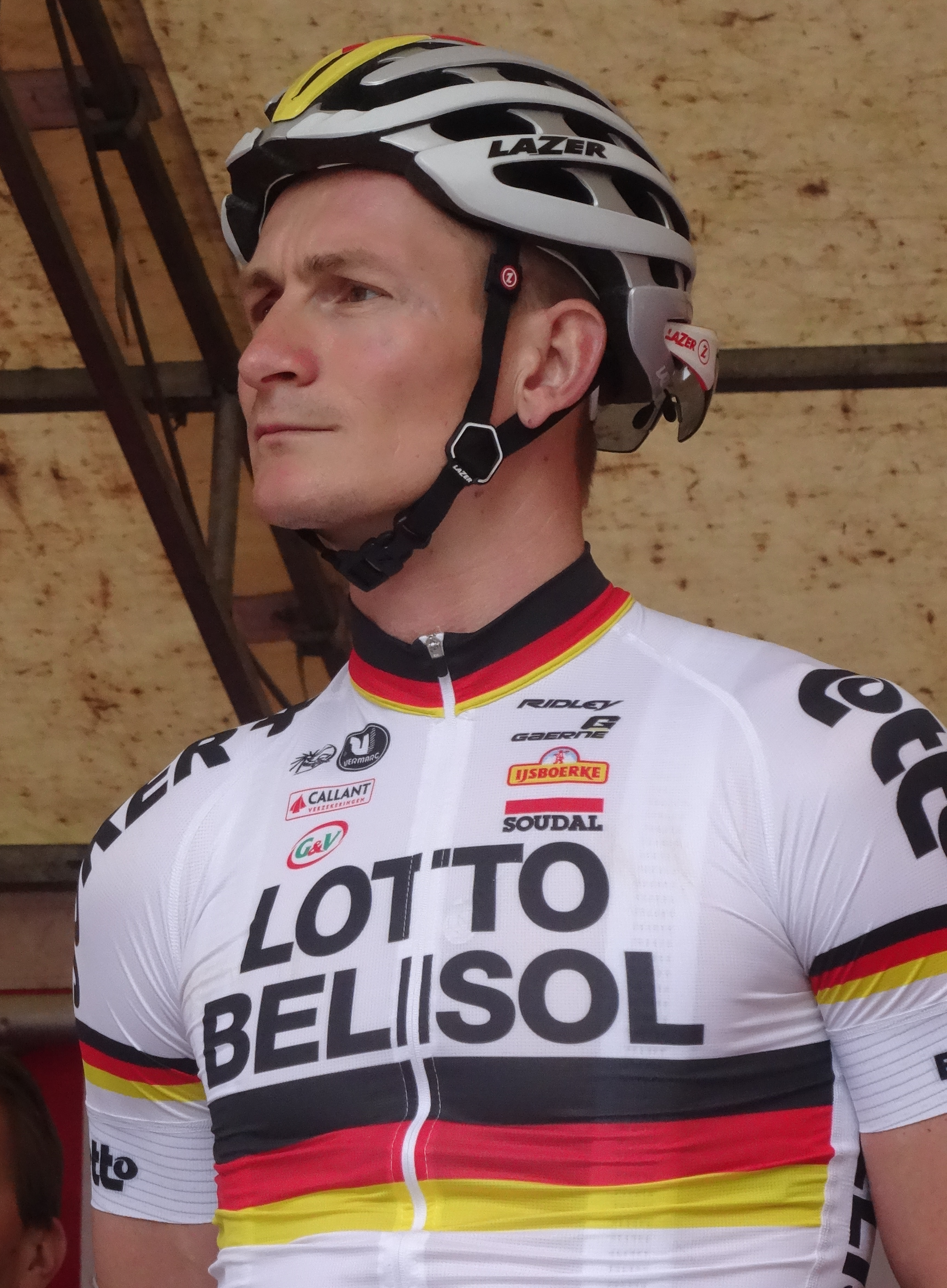 Reportage photographique réalisé le dimanche 14 septembre à l'occasion du départ et de l'arrivée du Grand Prix Jef Scherens 2014 à Louvain, Belgique.